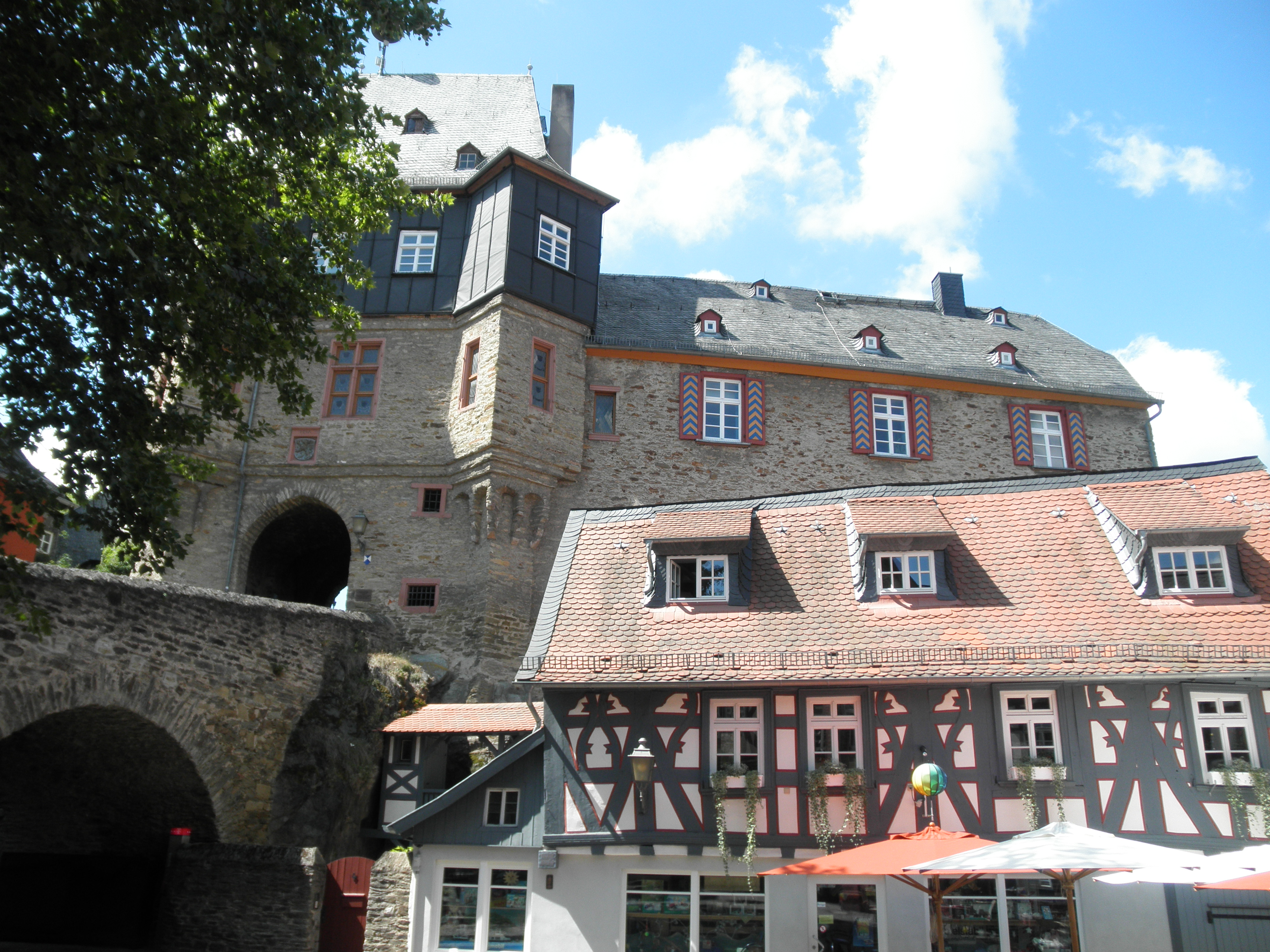 Torbogengebäude der Burg Idstein (Adresse Schloßgasse 14 bis 20), vorn rechts das Haus König-Adolf-Platz 4